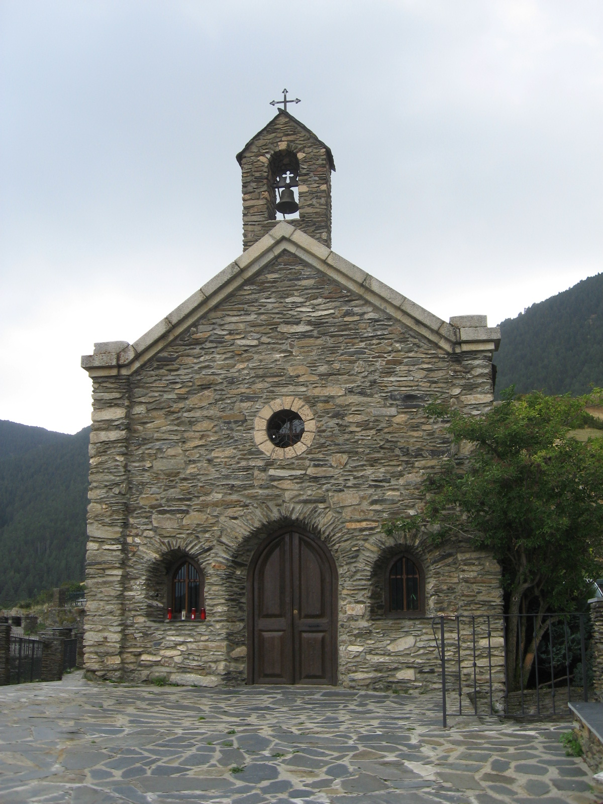 Santuari de la Mar de Déu de Canòlic